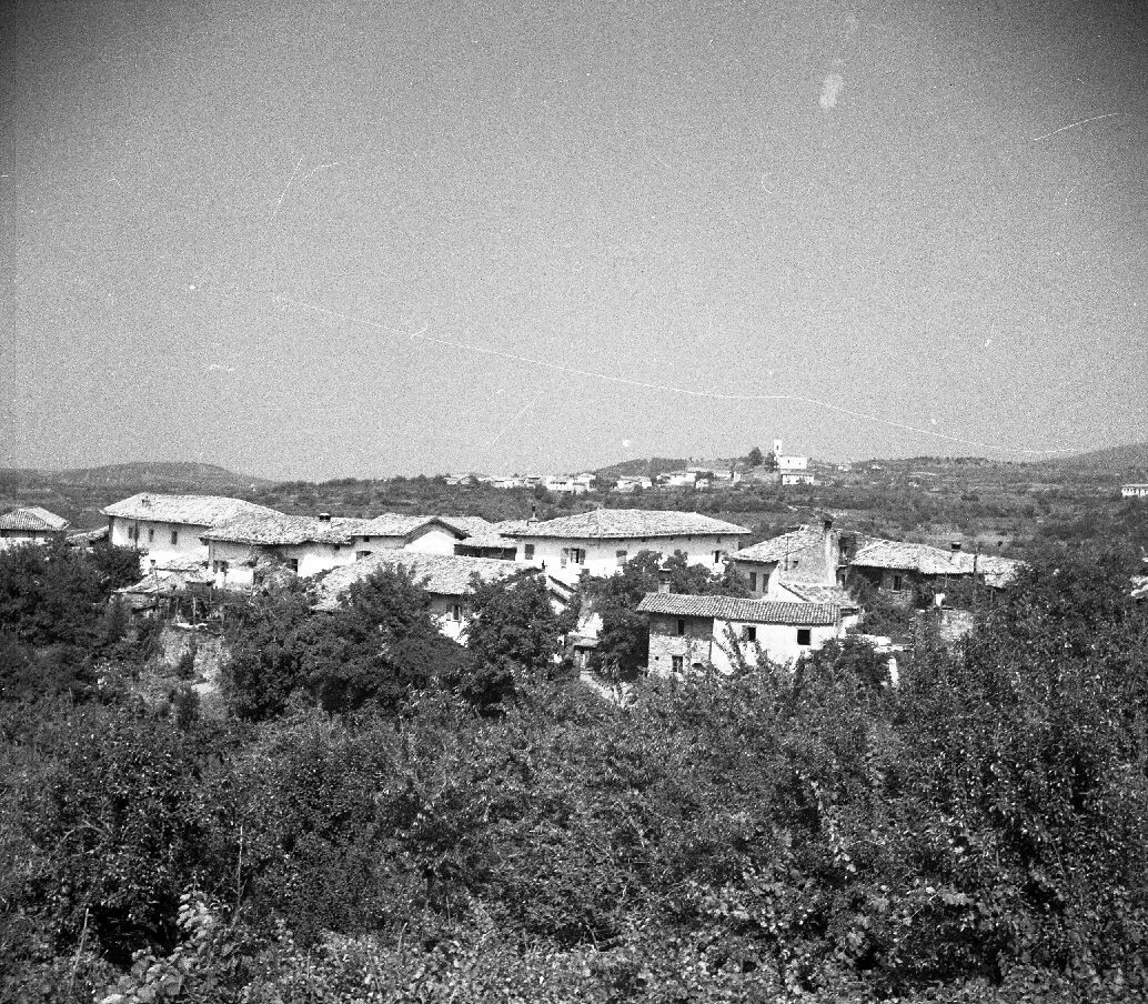 Vas Imenje, v ozadju Vedrijan.